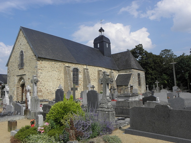 Église Saint-Martin à Poilley (50).